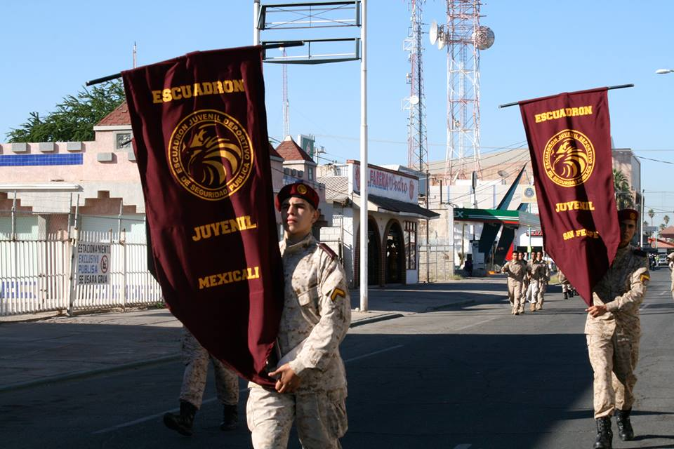 Jóvenes integrantes del ESJUDE durante el desfile cívico-militar conmemorativo del inicio de la lucha de independencia de México.